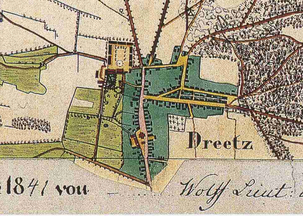 Dreetz, Landkreis Ostprignitz-Ruppin, Brandenburg, Ausschnitt aus dem Urmesstischblatt 3140 Neustadt (Dosse) von 1841